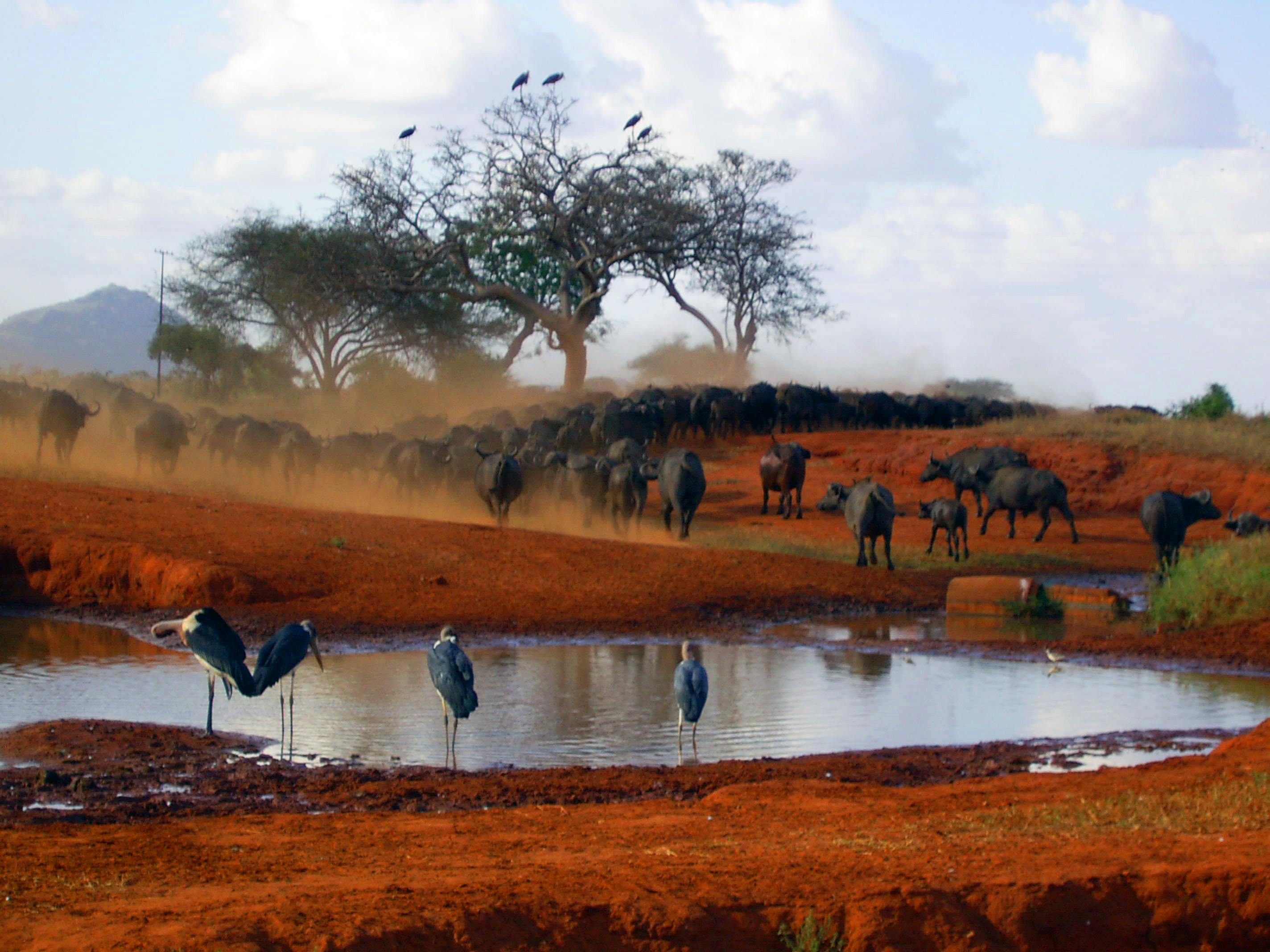 Büffelherde Bkmiles